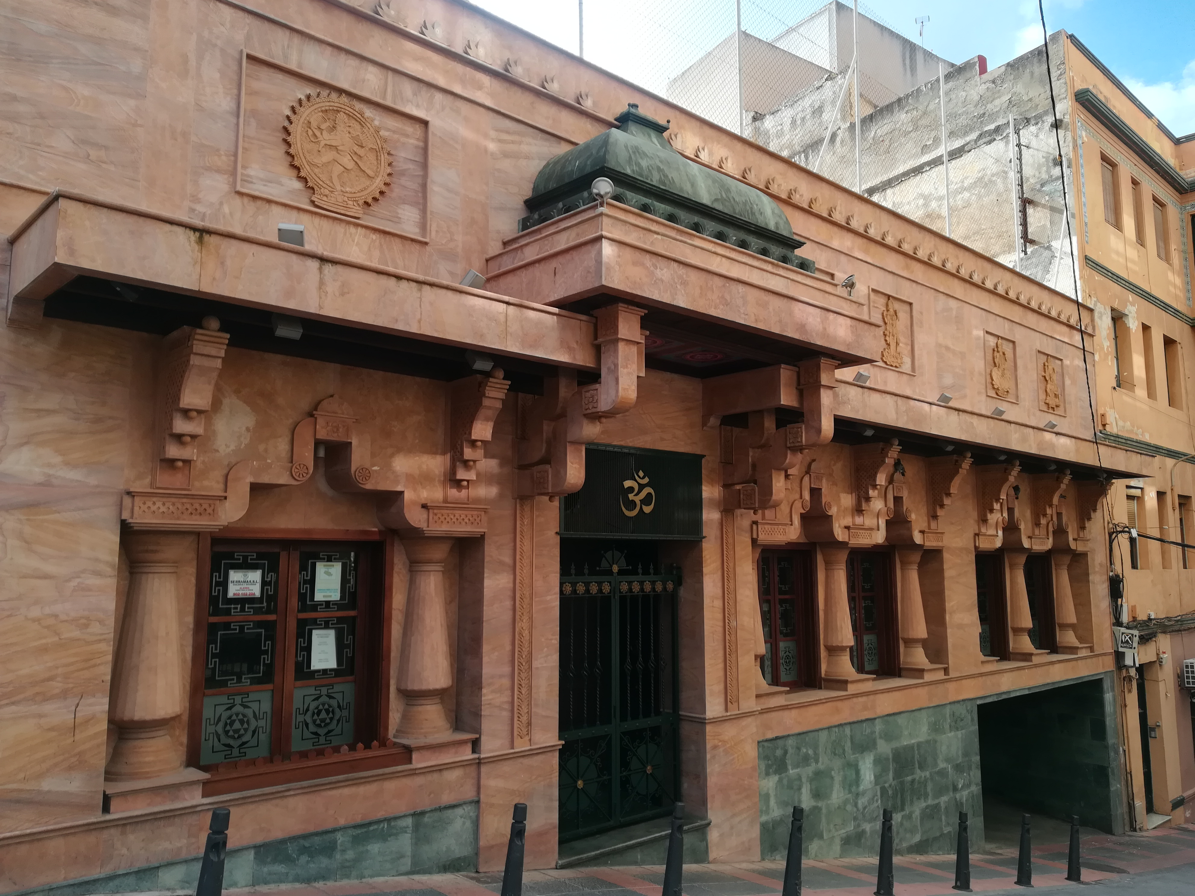 Templo Hindú de Ceuta. España.